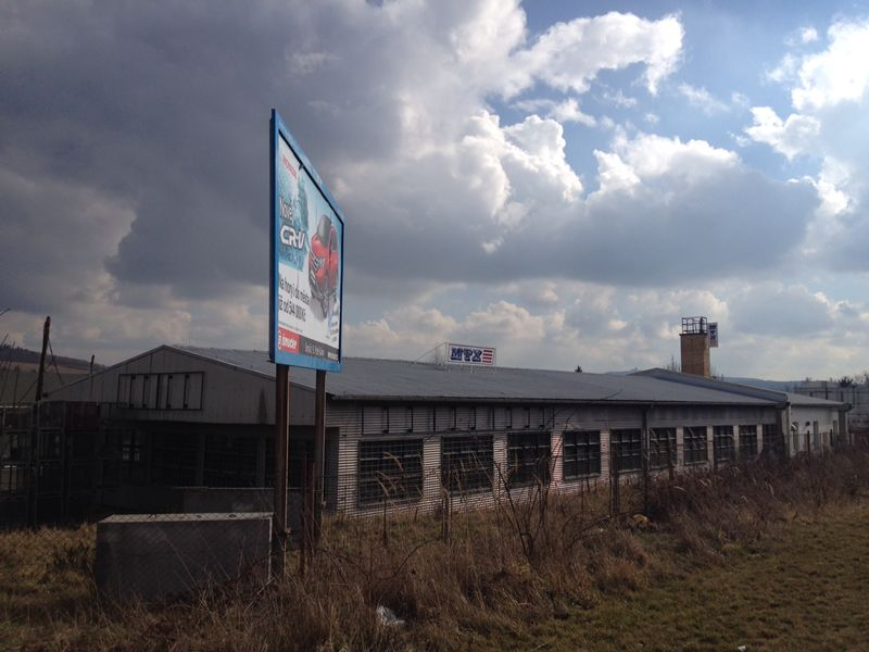 závod MTX Plzeň, Koterovská ulice 179